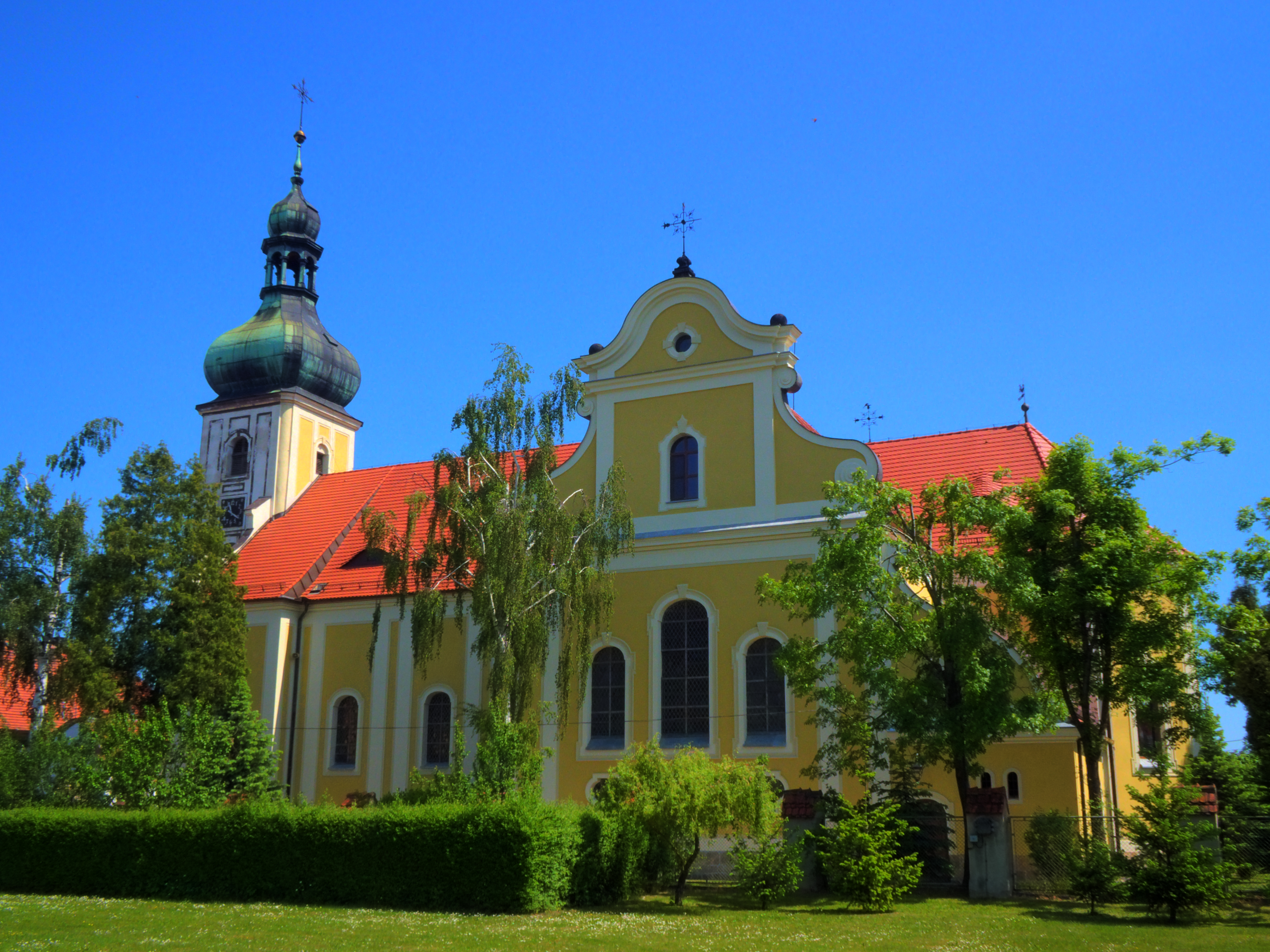 Kościół św. Jana Chrzciciela i św. Mikołaja w Nysie, prawa elewacja. Zdjęcie wykonane z ogrodu kościelnego.